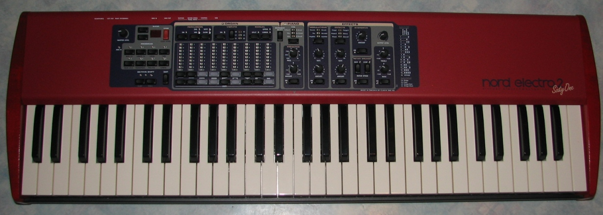 Clavia Nord Electro 2 61 keys